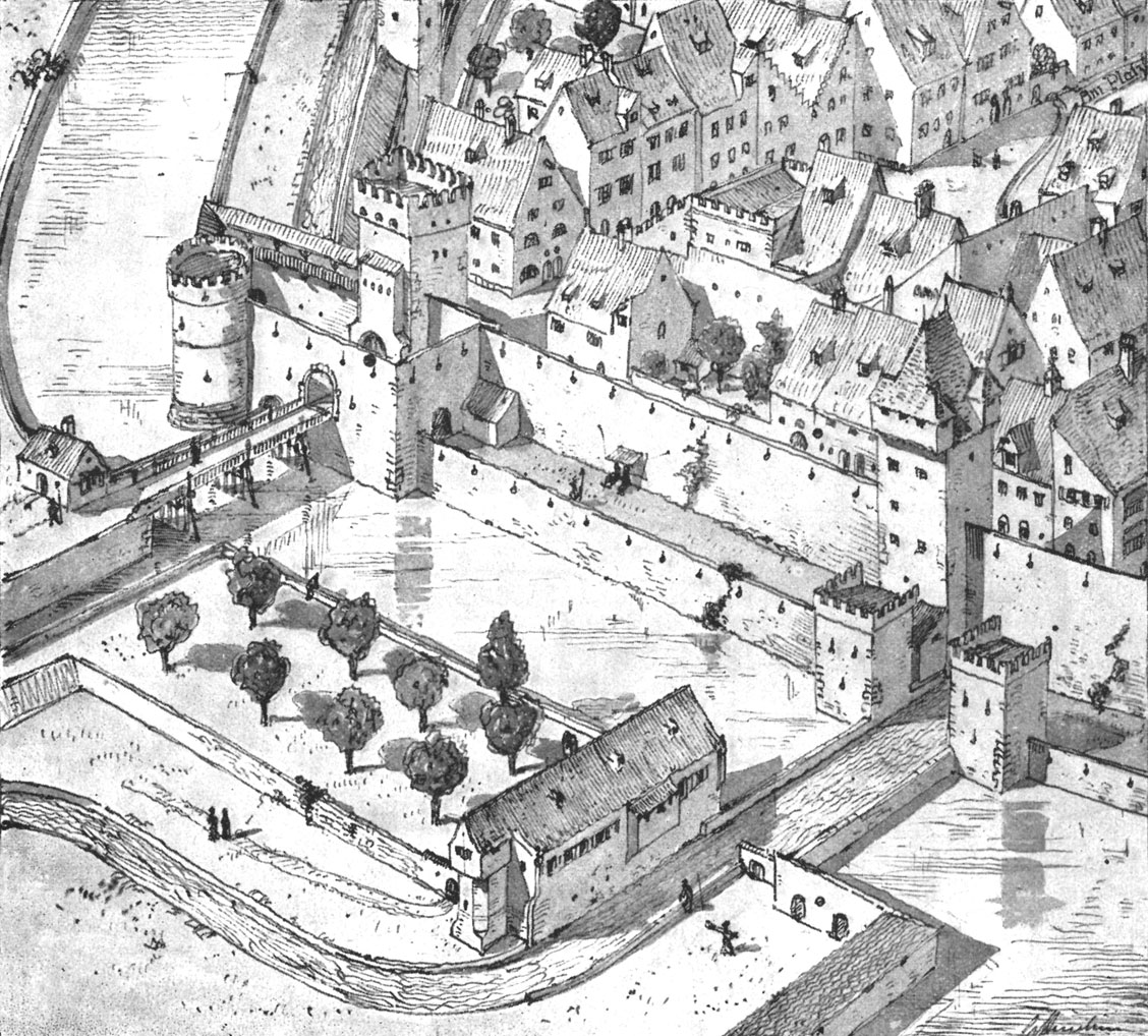 Abb. 33. Das Wurzertor und der Falkenturm.